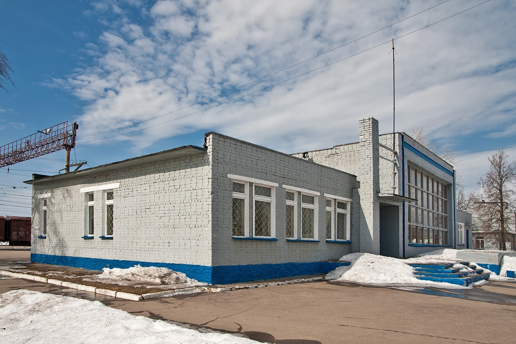 Вокзал станции Киржач Большое кольцо МЖД (БМО)